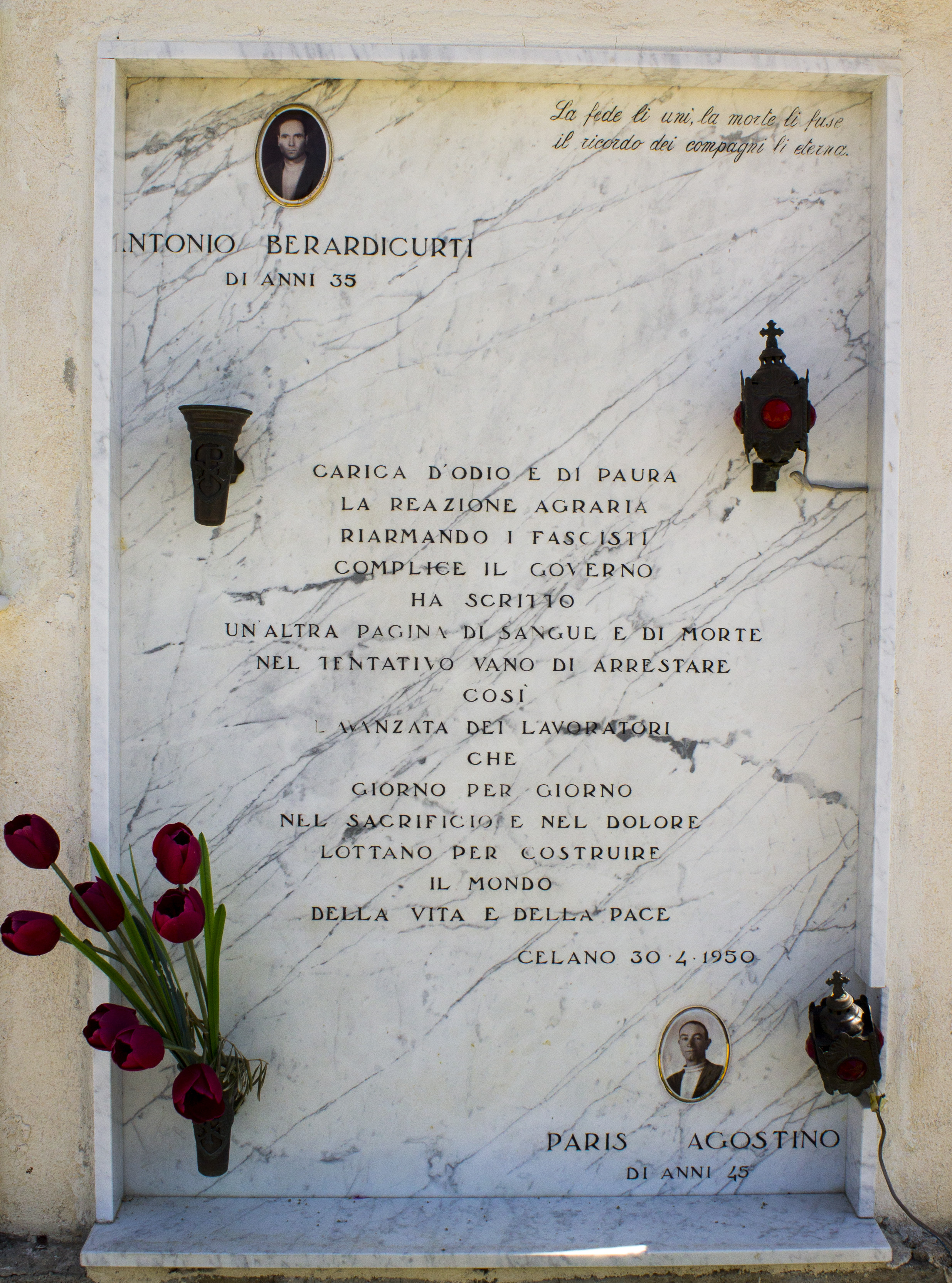 Lapide di Agostino Paris e Antonio Berardicurti - Uccisi nell'Eccidio di Celano